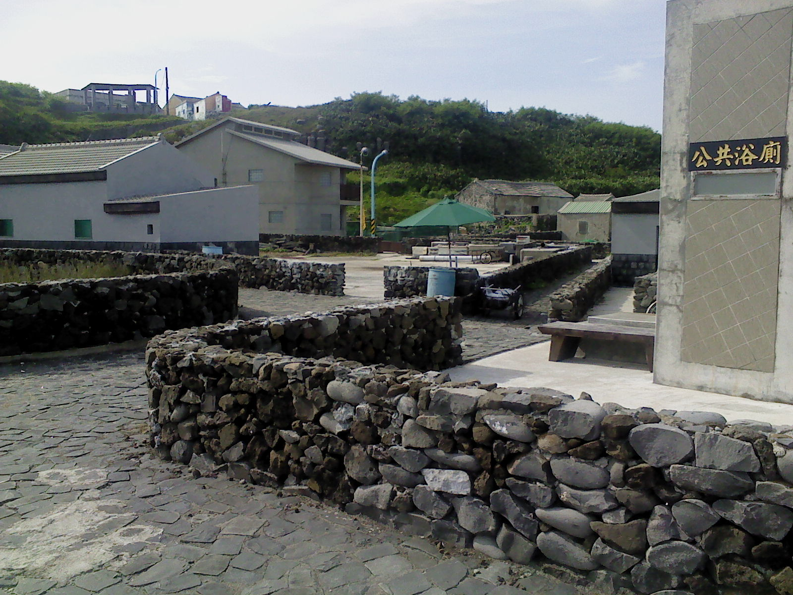 中文（台灣）: 澎湖桶盤嶼之菜宅